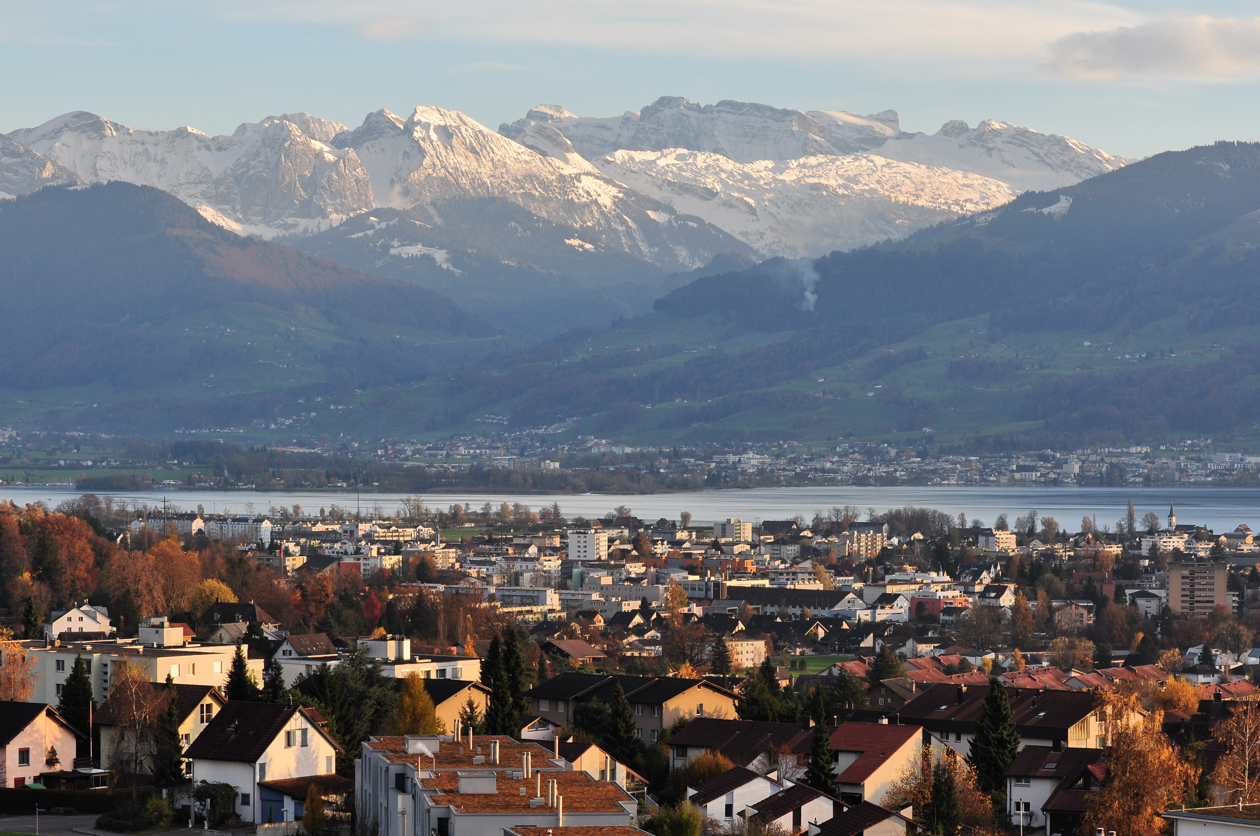 Kempraten-Lenggis in Rapperswil-Jona (Switzerland), Jona, Obersee (upper Lake Zürich), Lachen and Wägital in the background.